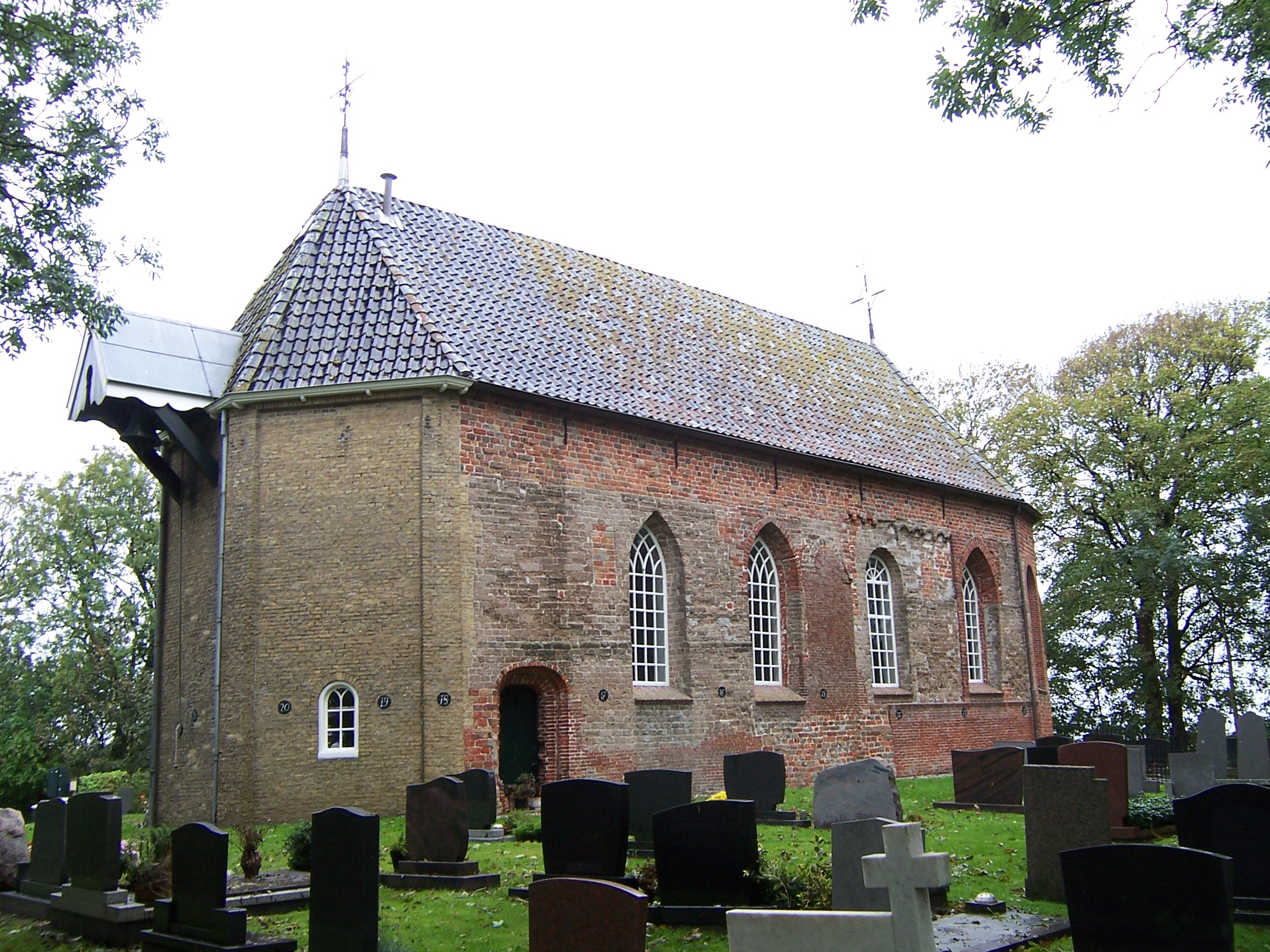 Kerk Wetsens Zuidmuur